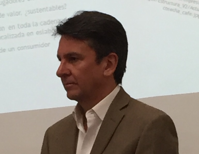 Conferencia en Doctorado en Economía en la UNAM